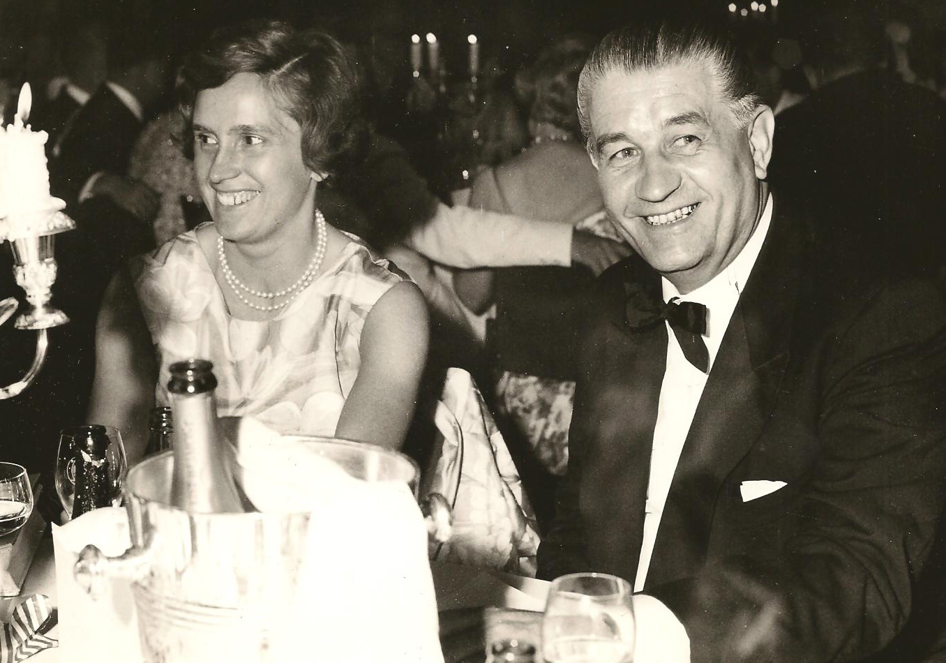 Wilhelm und Henriette Fay im Zoogesellschaftshaus Frankfurt